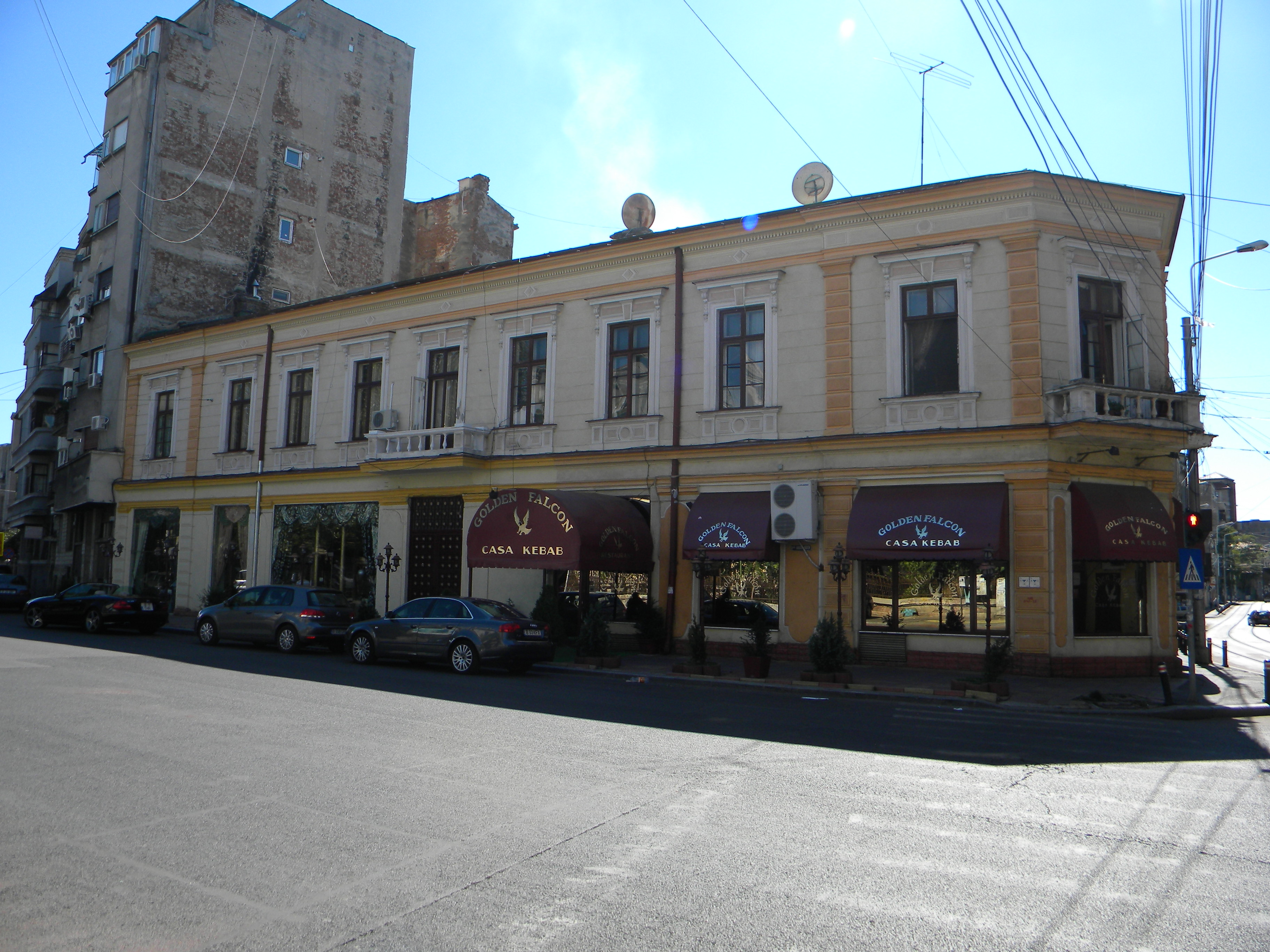 Bucuresti, Romania, Strada Hristo Botev nr. 20 (imobil), sect. 3